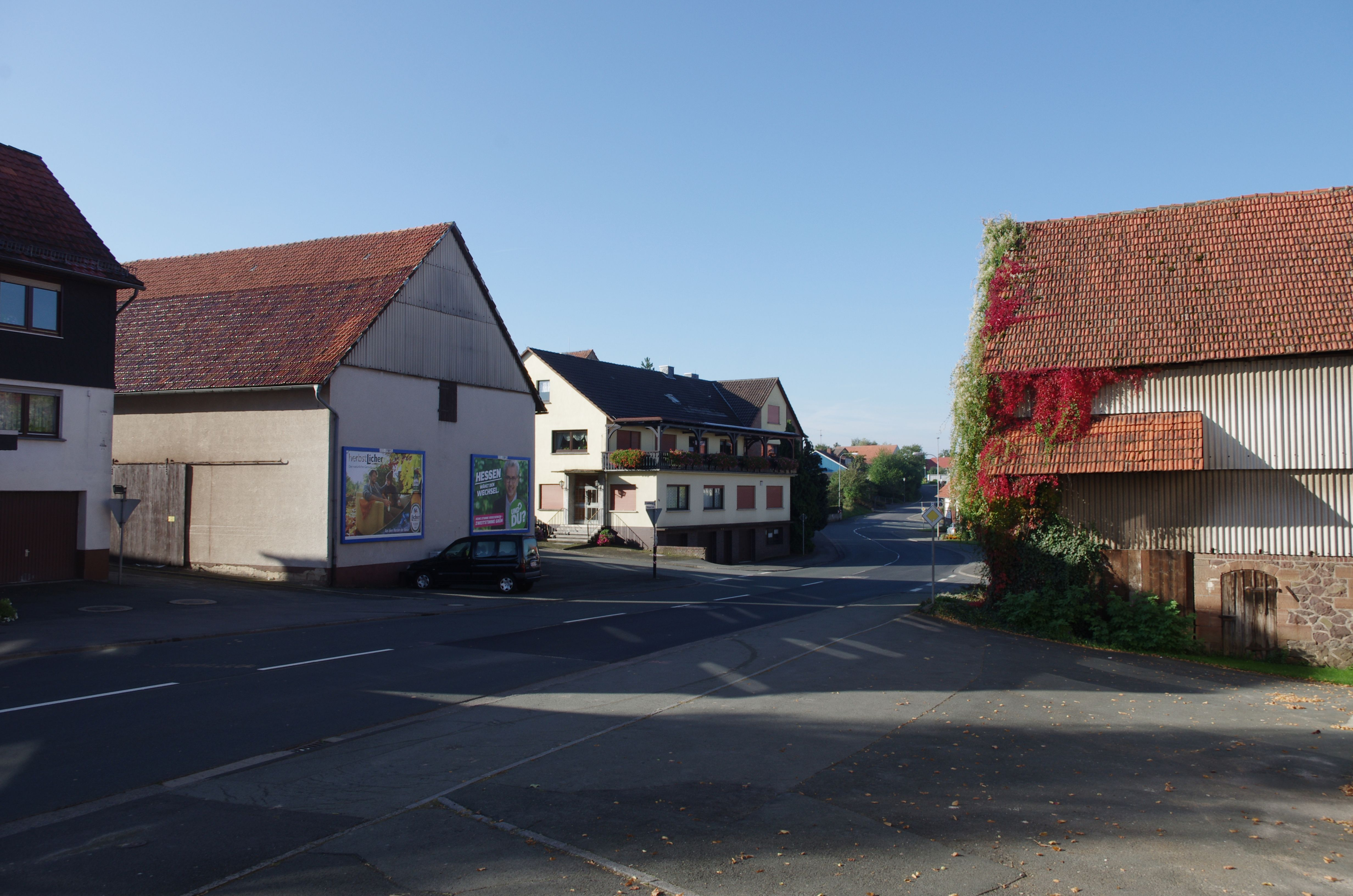 Frankenberg Ortsteil Geismar in Hessen. Die Wildunger Straße ist die Hauptstraße des Ortes.